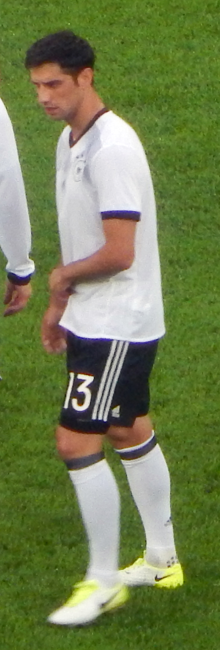 Финал Кубка конфедераций 2017